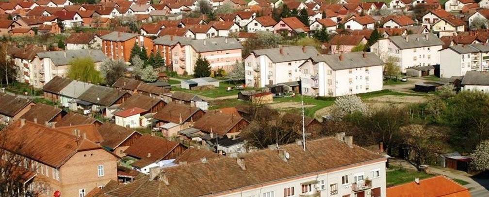 Panorama istočnog dijela Đurđenovca, Hrvatska.